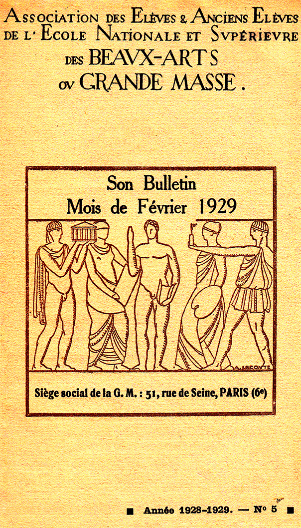 Couverture du Bulletin de la Grande Masse des Beaux-Arts - Année 1928-1929, n°5, février 1929